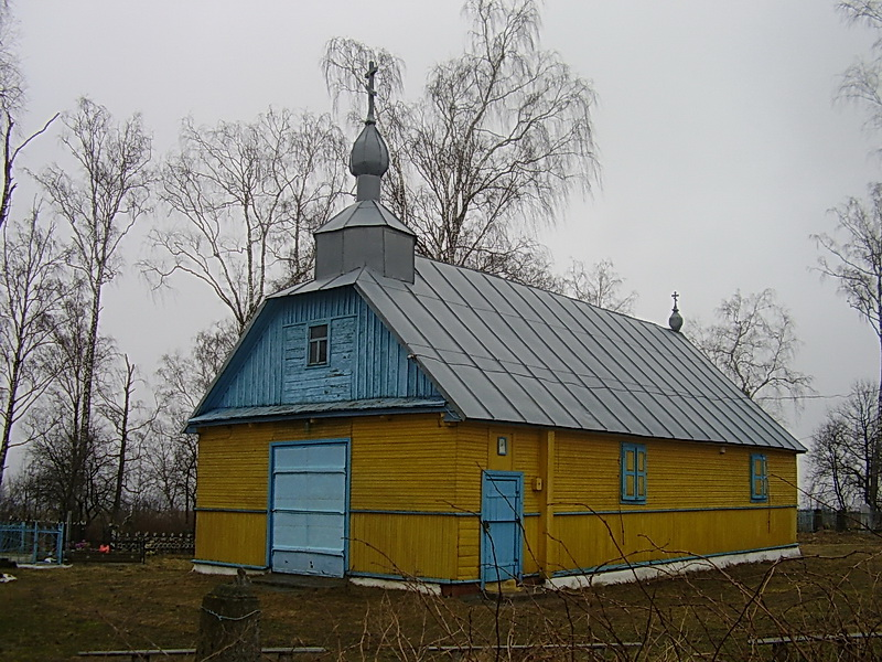 Лукі (Карэліцкі раён). Царква